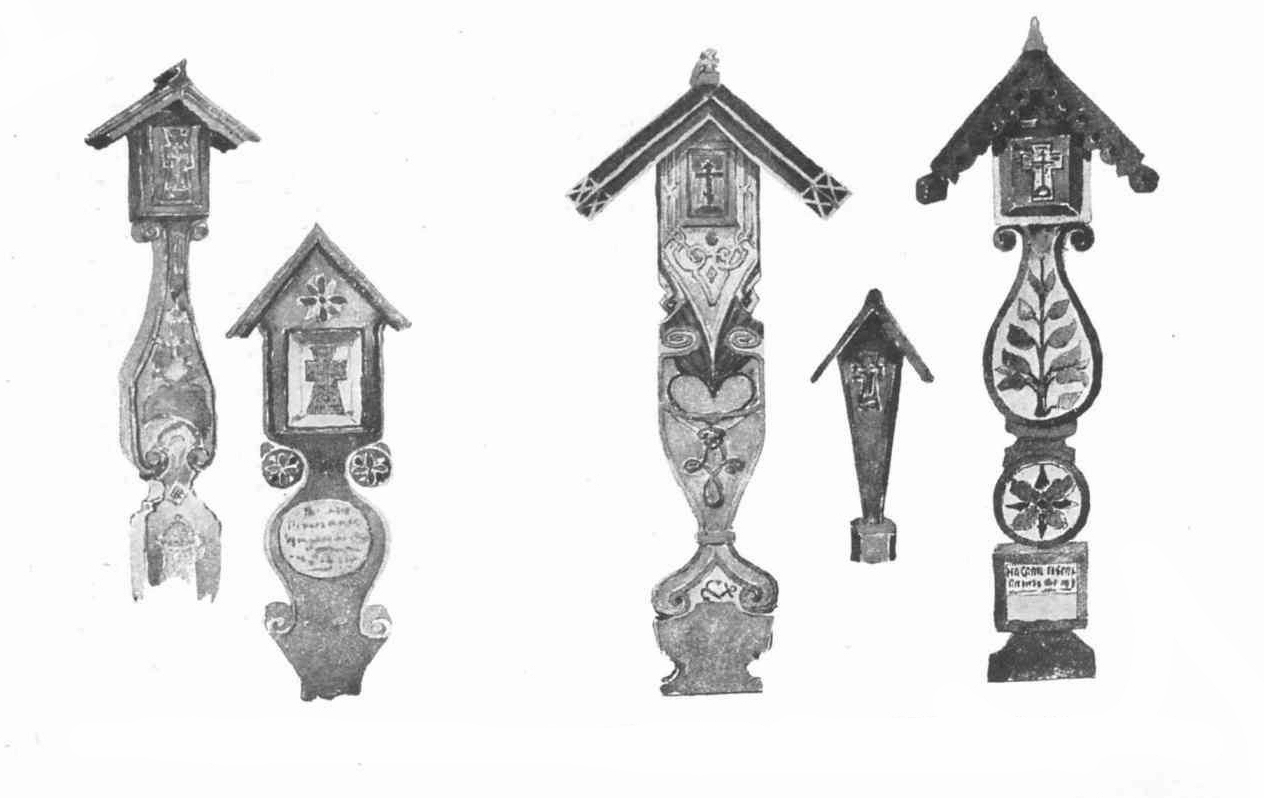 Кемь (Архангельская губерния). Намогильные кресты старообрядцев.